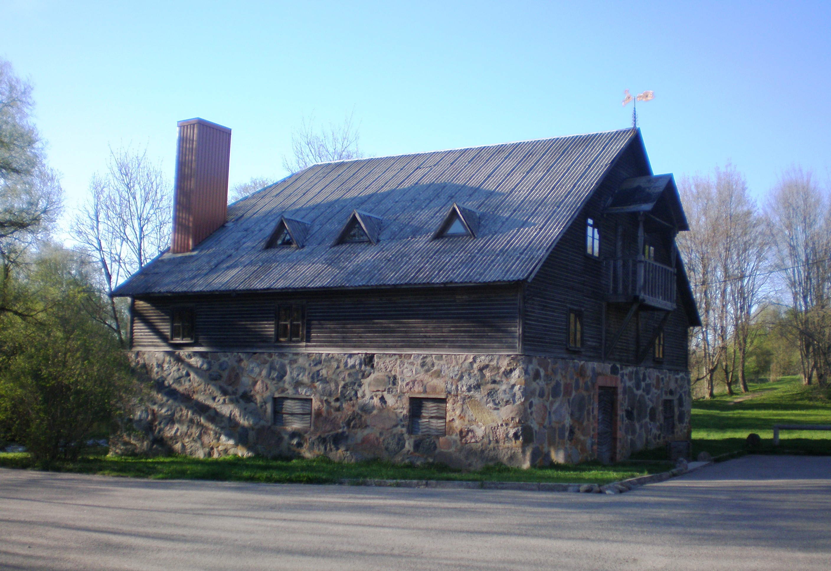 Vandens malūnas, Barkūniškis, Krakių sen., Kėdainių raj.